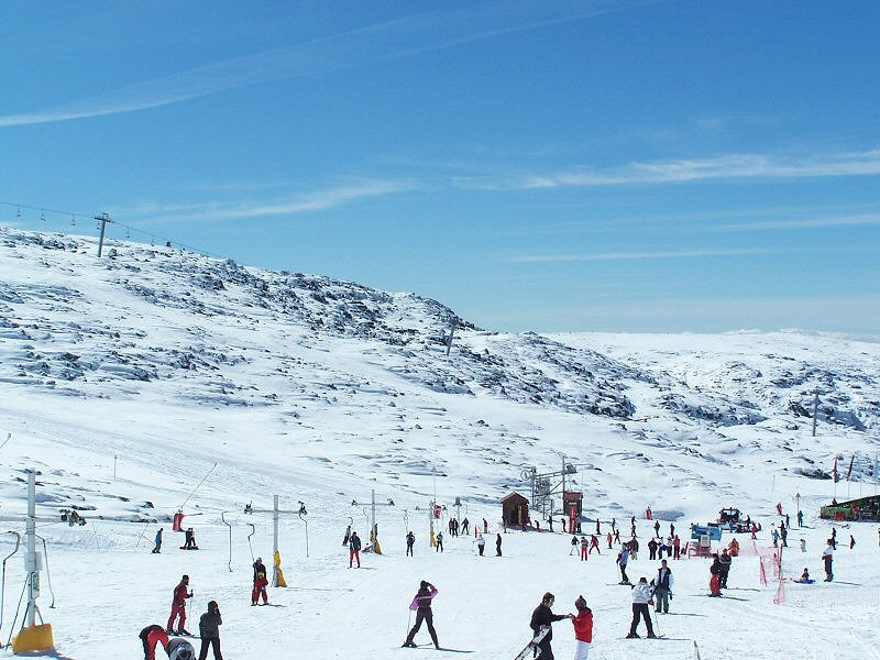 Torre - Serra da Estrela - Portugal, higher place of Continental Portugal user:sacavem (pt) (usuário:sacavem)